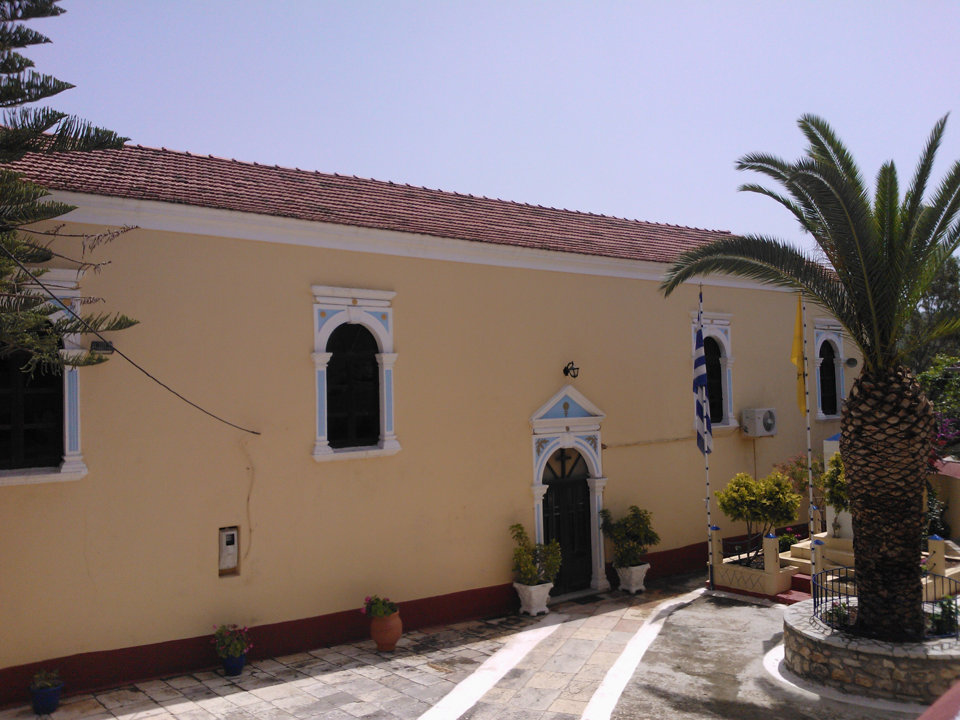 Православная церковь в Спартохори на острове Меганиси